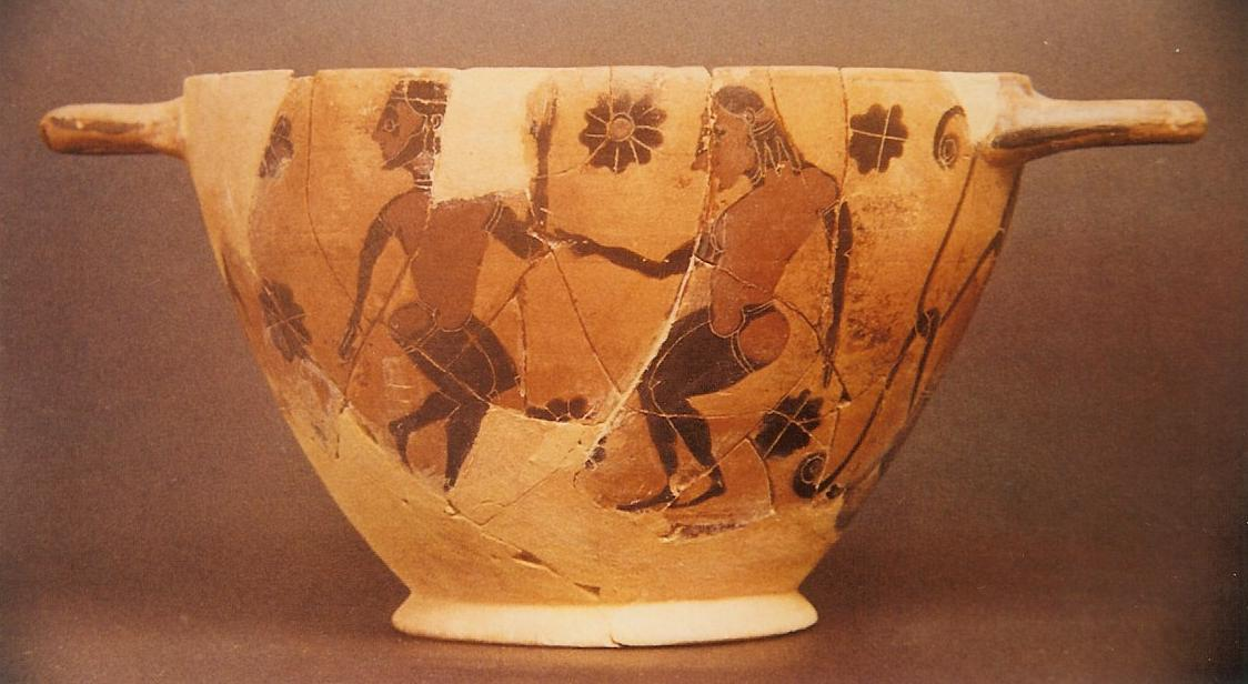 Metauros, skyphos di produzione calcidese